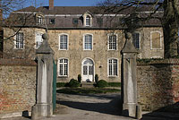 Le Manoir du Huisbois à Le Wast